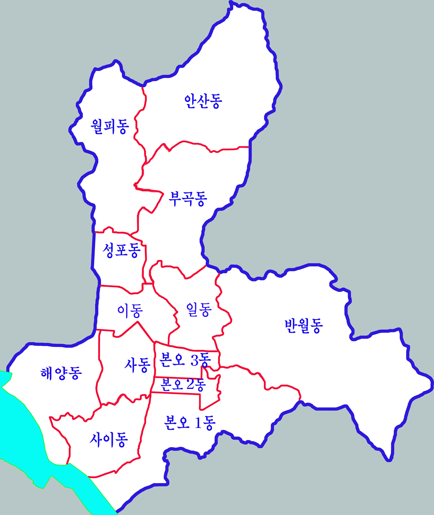 안산시 상록구지도